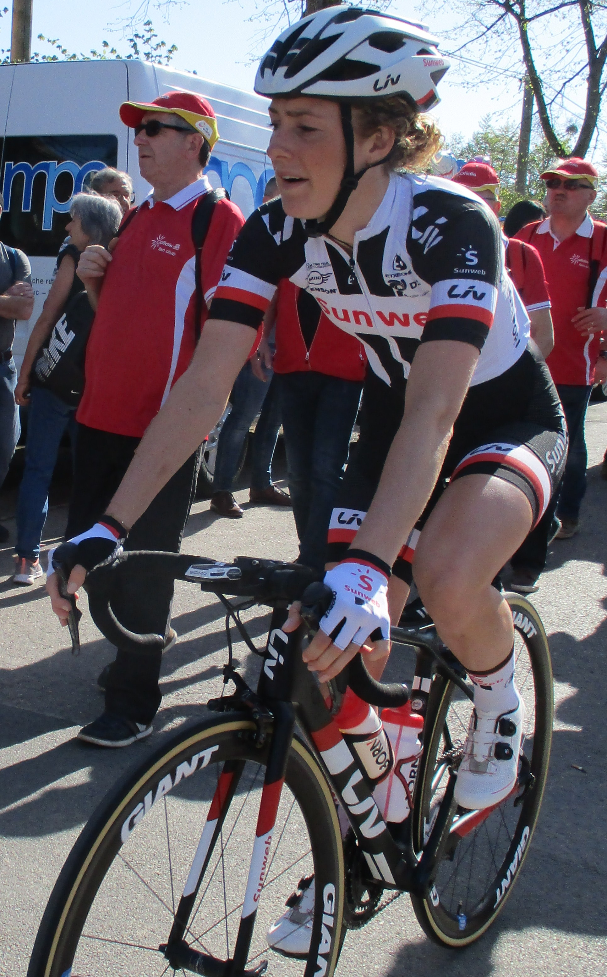 Start van de Waalse Pijl 2018 op de Mur van Huy.